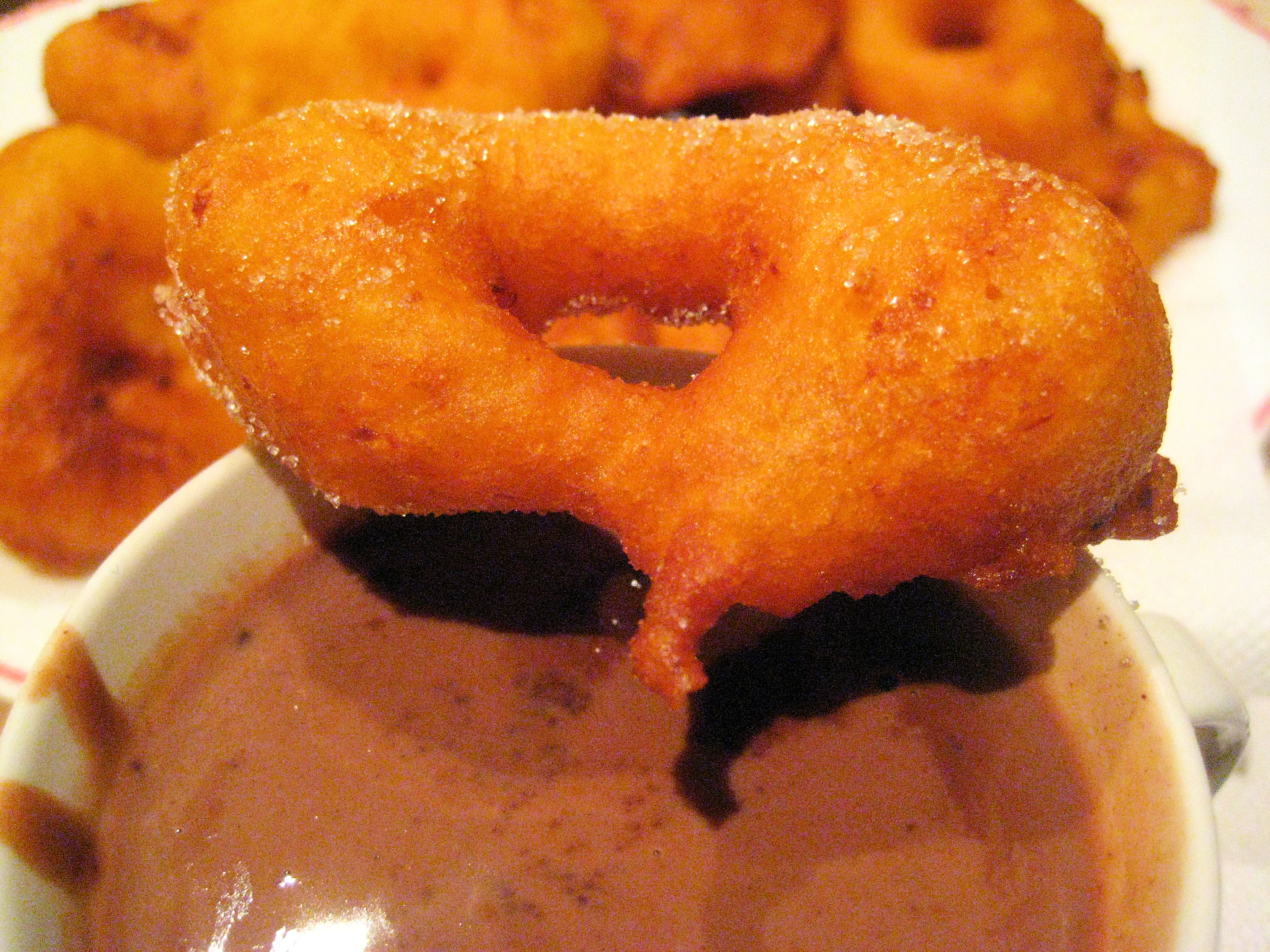 Buñuelos con chocolate, desayuno típico valenciano